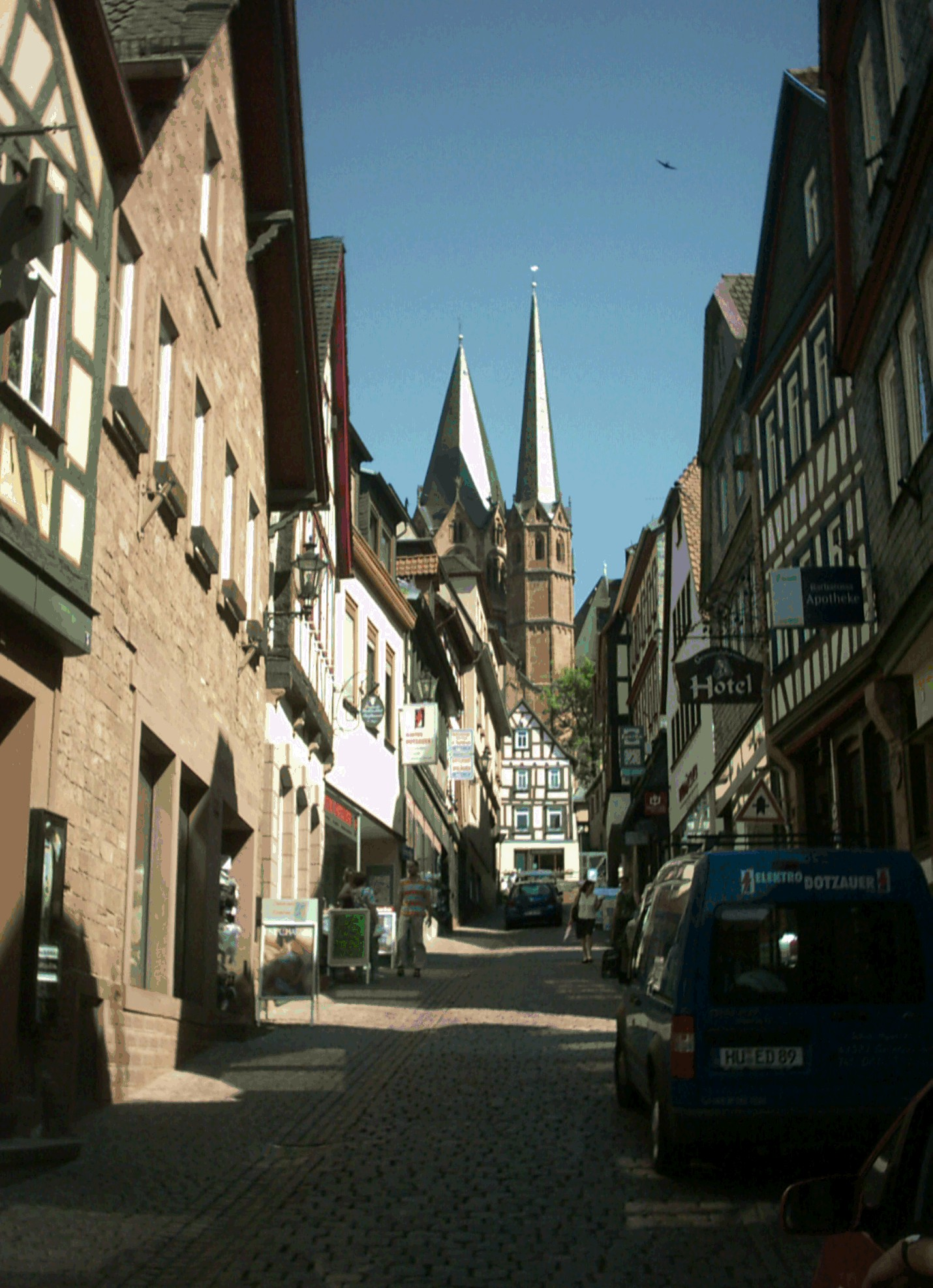 Altstadt Gelnhausen mit der Marienkirche im Hintergrund Fotograf: presse03, selbst fotografiert 2005 Lizenz: GNU-FDL